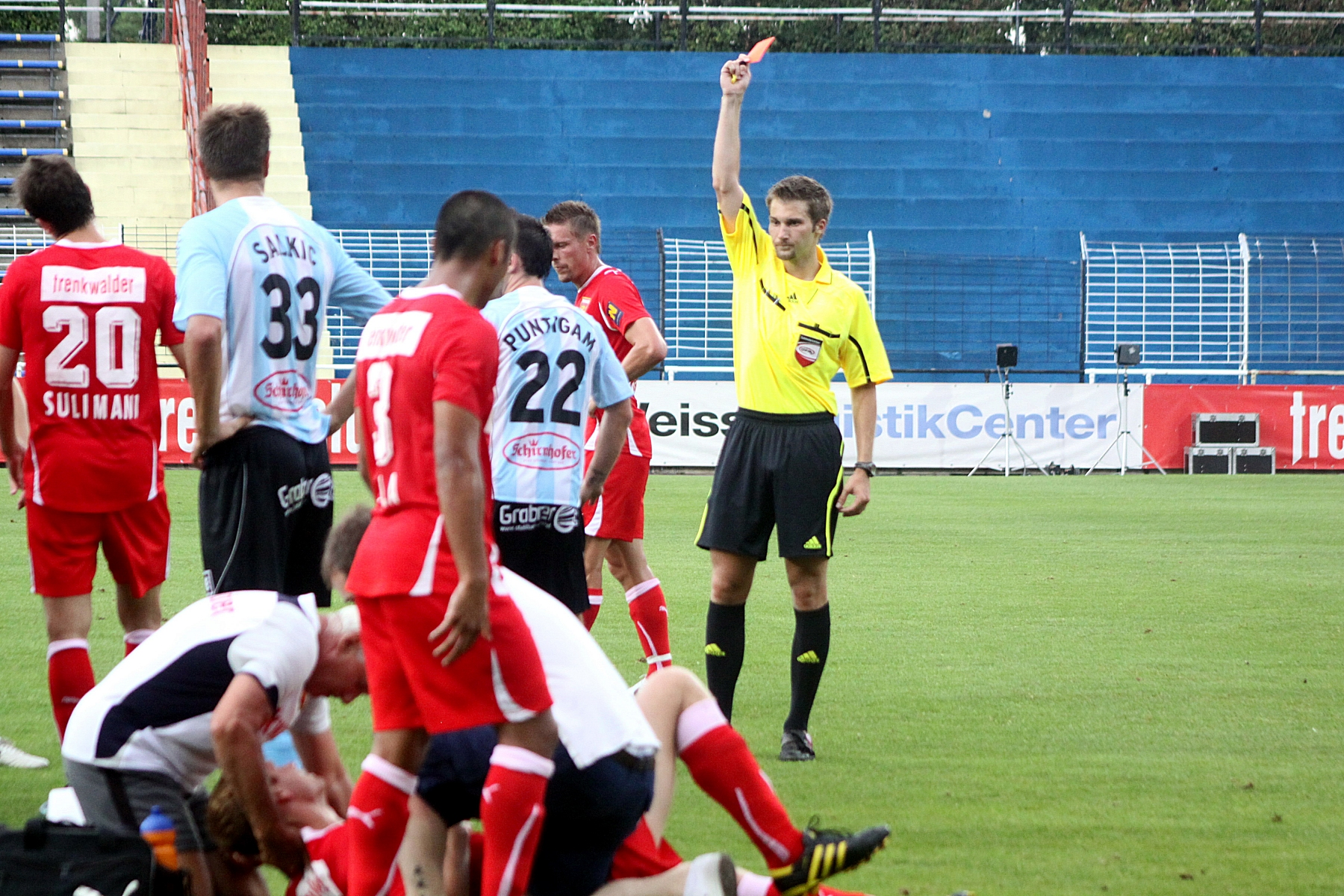 Erste Liga: FC Admira Wacker Mödling gegen TSV Hartberg 2010-07-23: Schiedsrichter Dominik Ouschan zeigt Gerald Puntigam (#22) nach einem Foul die rote Karte